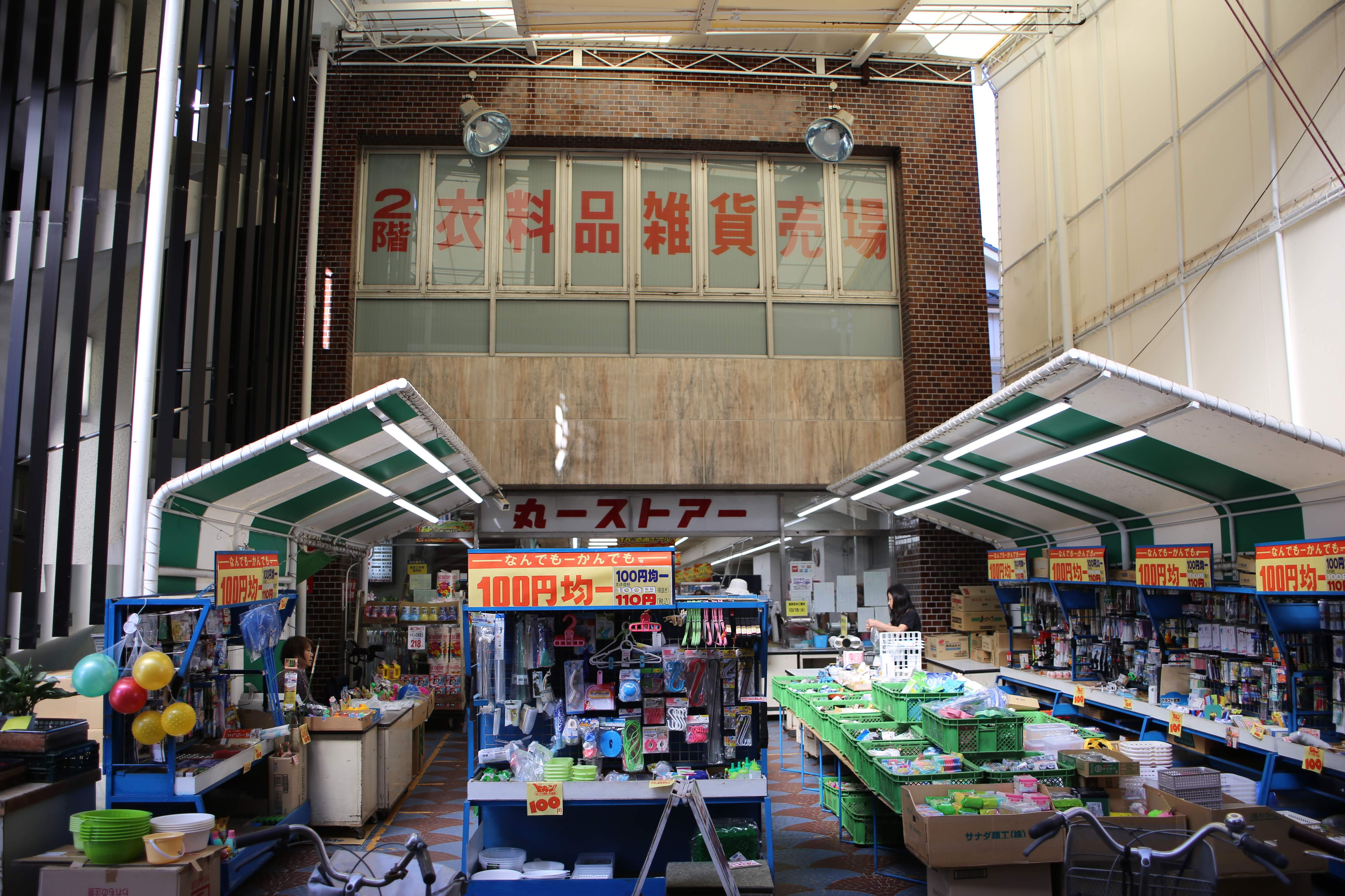 名古屋市西区那古野二丁目 丸一ストアー円頓寺店